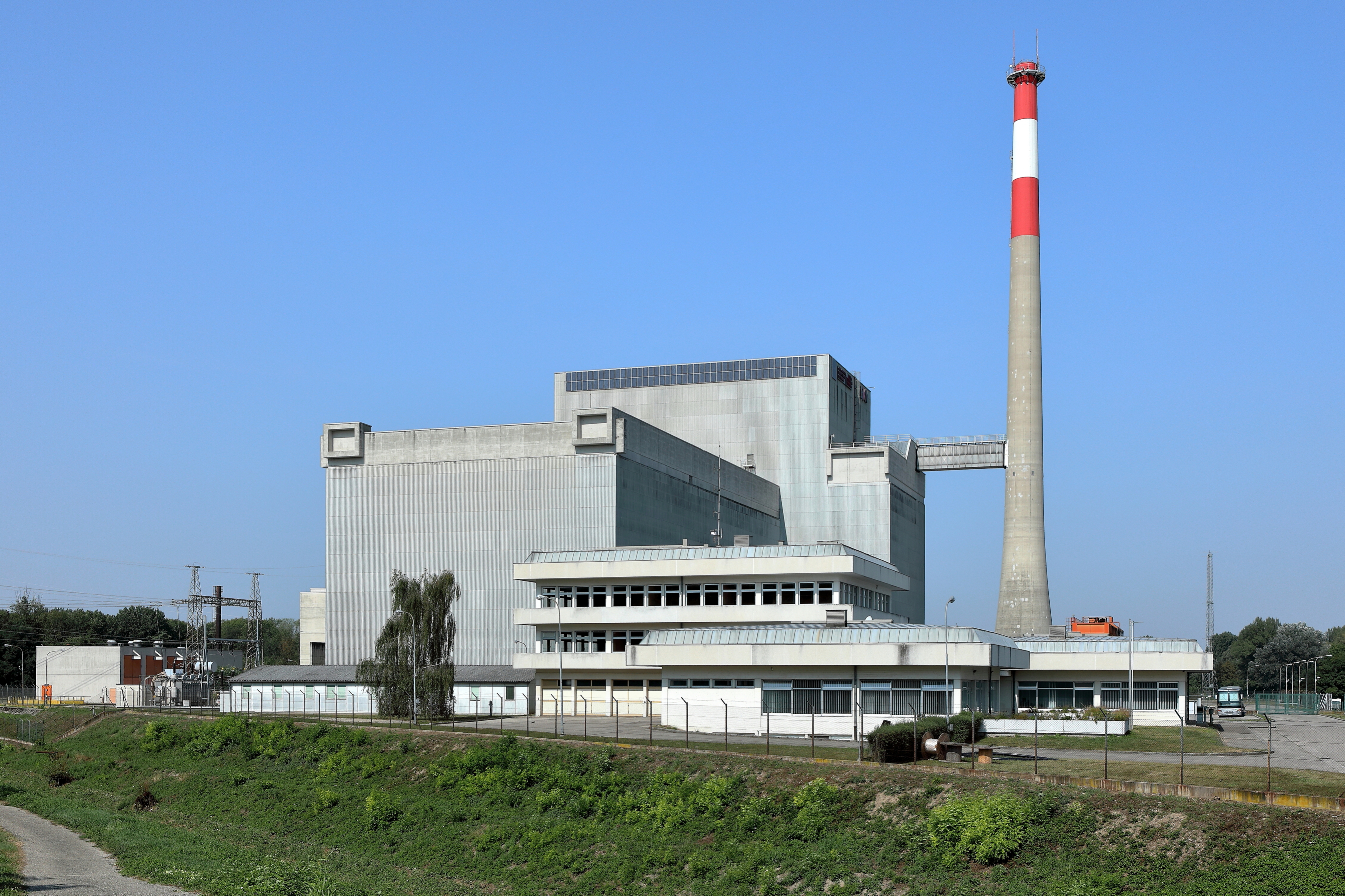 Südostansicht des nie in Betrieb genommenen Kernkraftwerks in der niederösterreichische Marktgemeinde Zwentendorf an der Donau.Der Spatenstich für das Atomkraftwerk mit dem rd. 110 m hohen Schornstein erfolgte am 4. April 1972 und war das erste von mehreren geplanten. Nach vier Jahren fand die Fertigstellung des Siedewasserreaktors mit einer Leistung von rd. 750 Megawatt (elektr. Energie für rd. 1,8 Mio. Haushalte) statt. Bei einer Volksabstimmung am 5. Nov. 1978 - die 1. Volksabstimmung in der 2. Republik - entschied das Wahlvolk mit 50,47%, dass der Atommeiler nicht in Betrieb genommen werden darf. Bis zur „stillen Liquidierung“ im März 1985 waren Kosten von etwa 14 Milliarden Schilling (1 Mrd. Euro) angefallen.